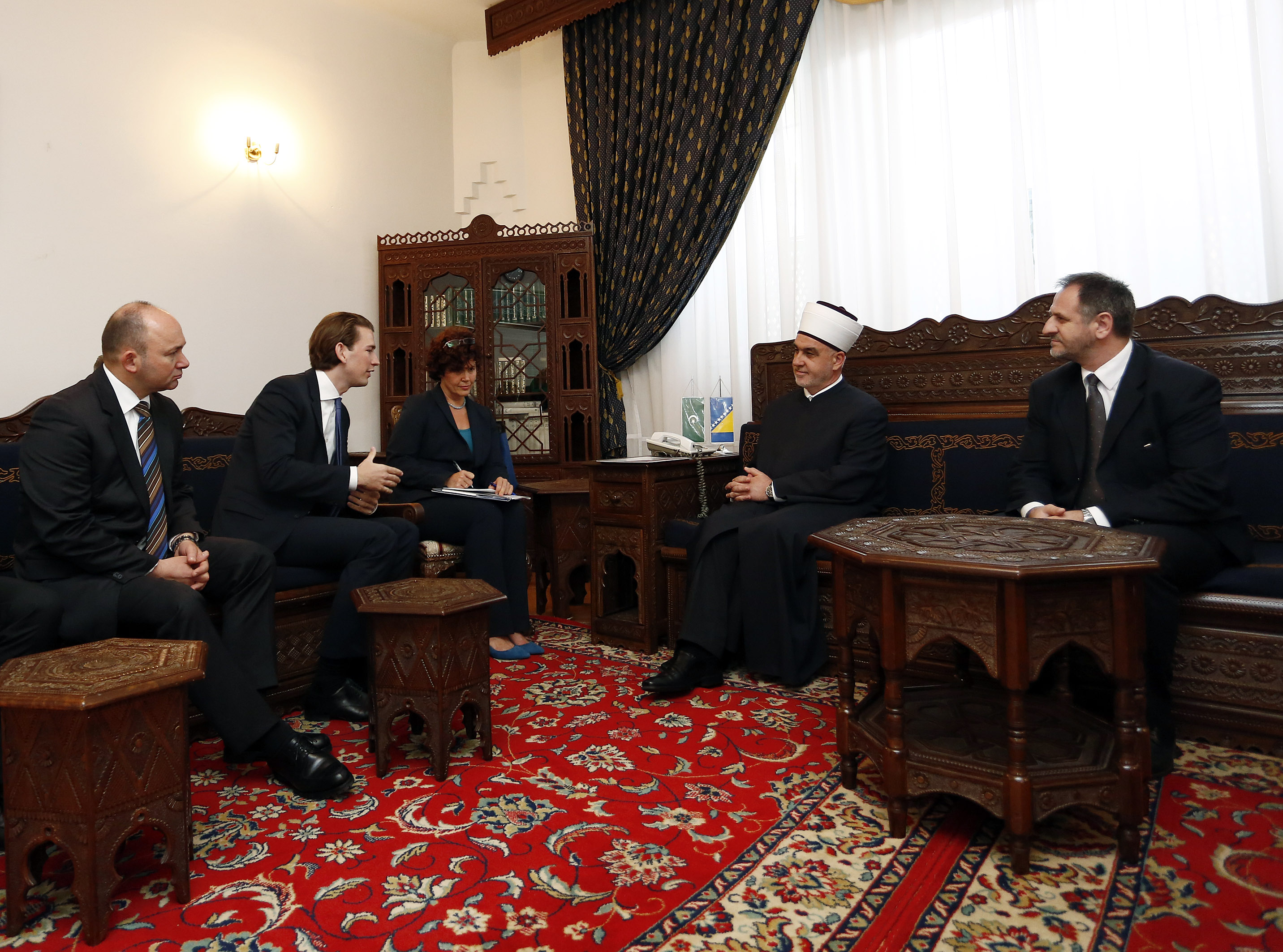 Arbeitsbesuch Bosnien. Bundesminister Sebastian Kurz trifft den bosnischen Großmufti Husein Kavazovic. Sarajevo, 18.06.2015, Foto: Dragan Tatic